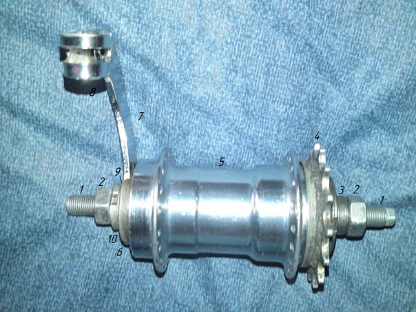 Втулка односкоростная в сборе (от велосипеда ММВЗ) 1. Ось; 2. Гайки крепёжные; 3. Конус правый; 4. Звёздочка ведущая; 5. Втулка задняя (часть обгонной муфты и тормозной системы); 6. Конус левый; 7. Рычаг тормозной; 8. Хомут; 9. Шайба с усиком; 10. Гайка шлицевая